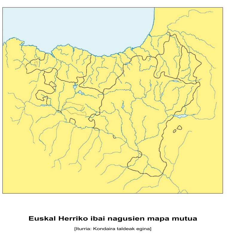 Euskal Herriko ibai nagusien mapa mutua, UEUren kondaira.eus webgunetik hartua.